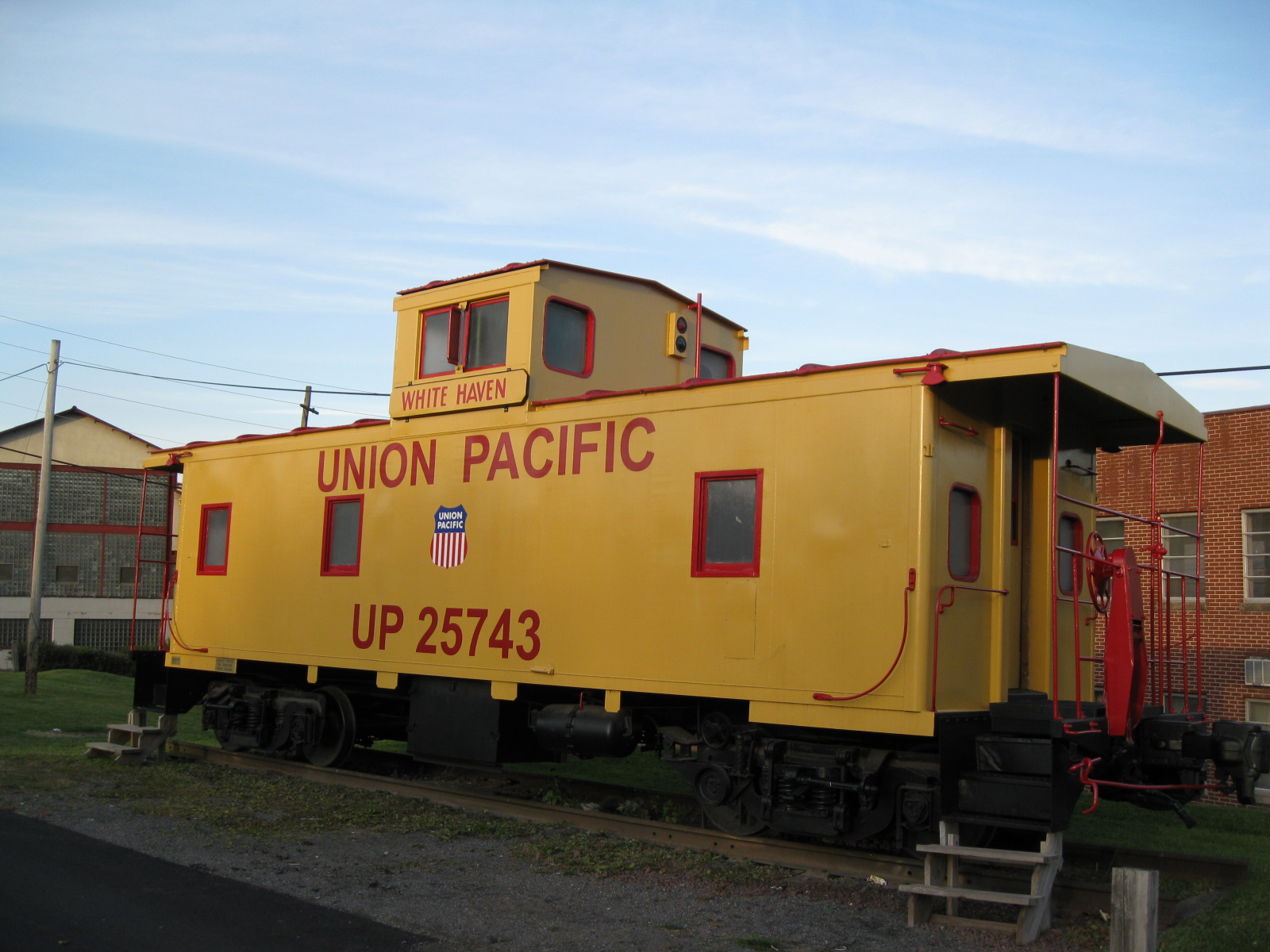 White Haven, Pennsylvania